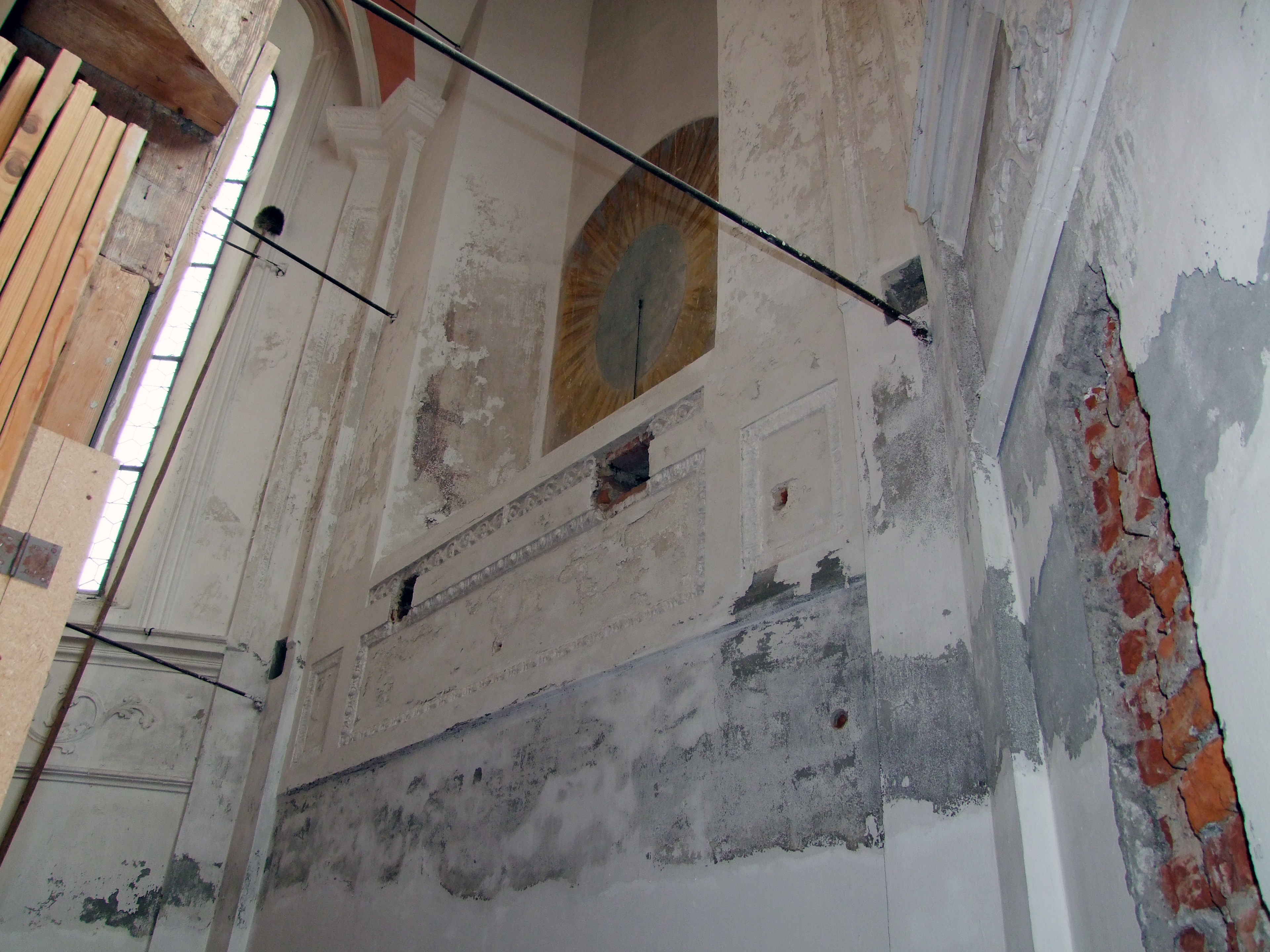 Mariä Verkündigung im oberschwäbischen Mindelheim. Ehemalige Augustiner, dann Jesuitenklosterkirche. Wasserschäden durch fehlerhaften Putz bei der Restaurierung in den 1970er Jahren. Stuckreste aus dem 17. Jahrhundert.